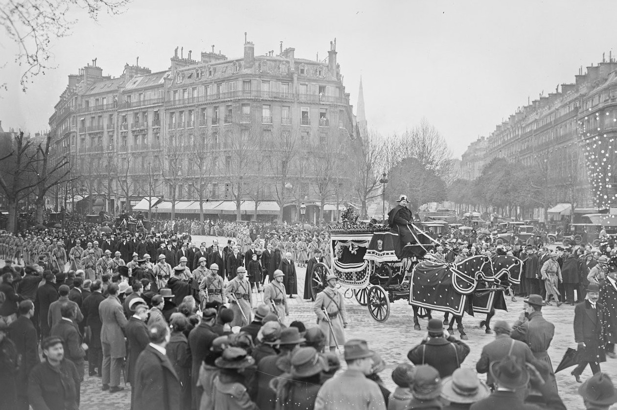 Obsèques de l'ancien président de la République Paul Deschanel, à Paris.